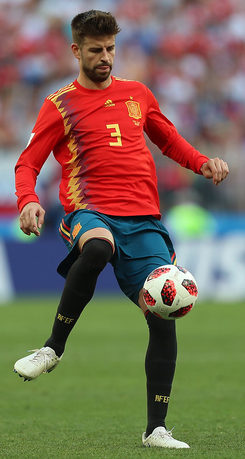 История творится на наших глазах! Россия бьет Испанию в серии пенальти